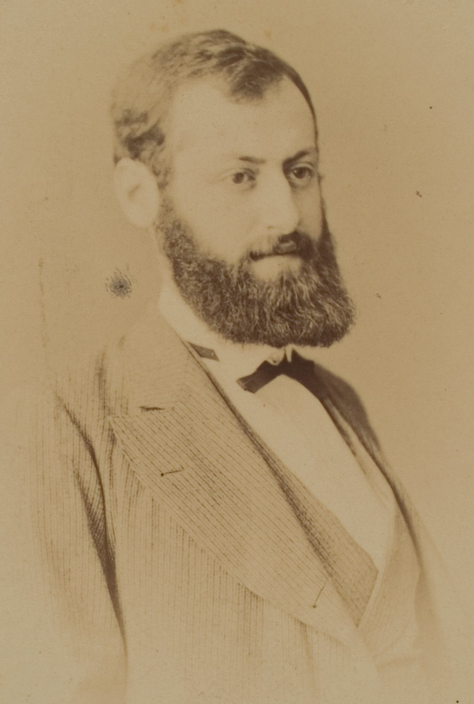 Max Conrat (Name bis 1882: Cohn), Rechtshistoriker, Literaturwissenschaftler und Romanist, 1873/1874 Privatdozent in Heidelberg